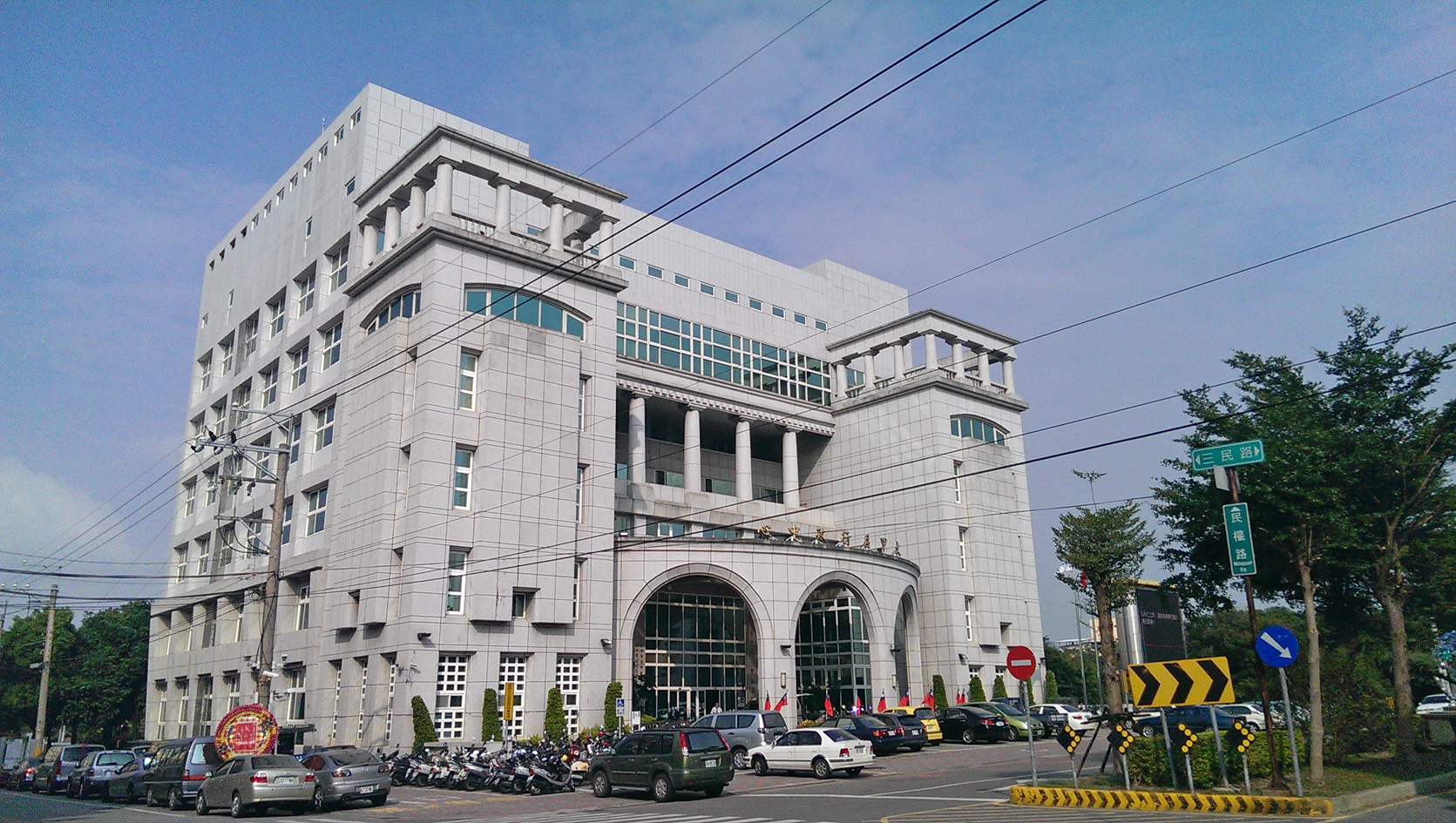 中文（台灣）: 臺中市大甲區行政中心。